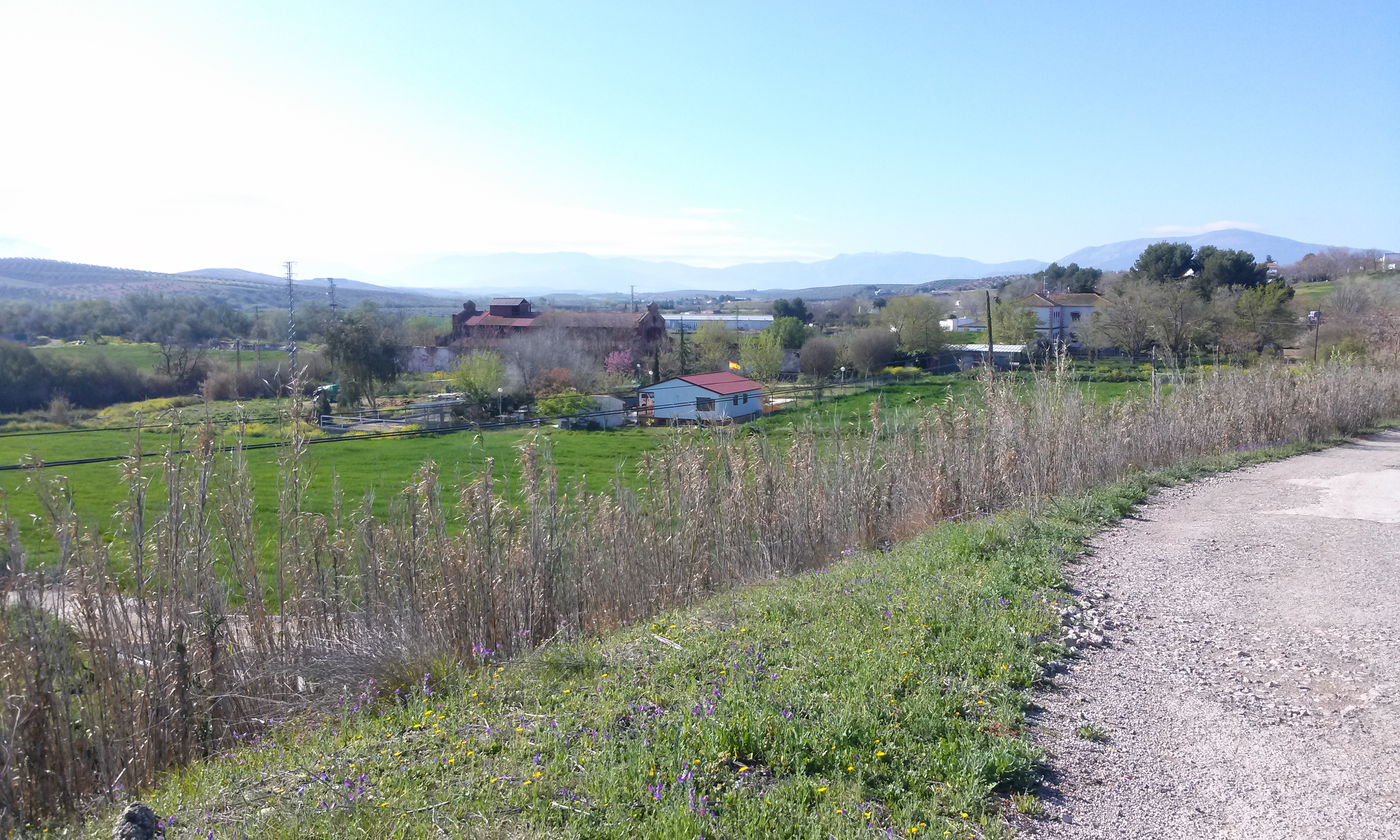 Antigua fábrica de minio en Las Infantas.